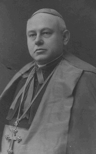 Georg Glosauer (1860 - 1926), Český římskokatolický kněz.